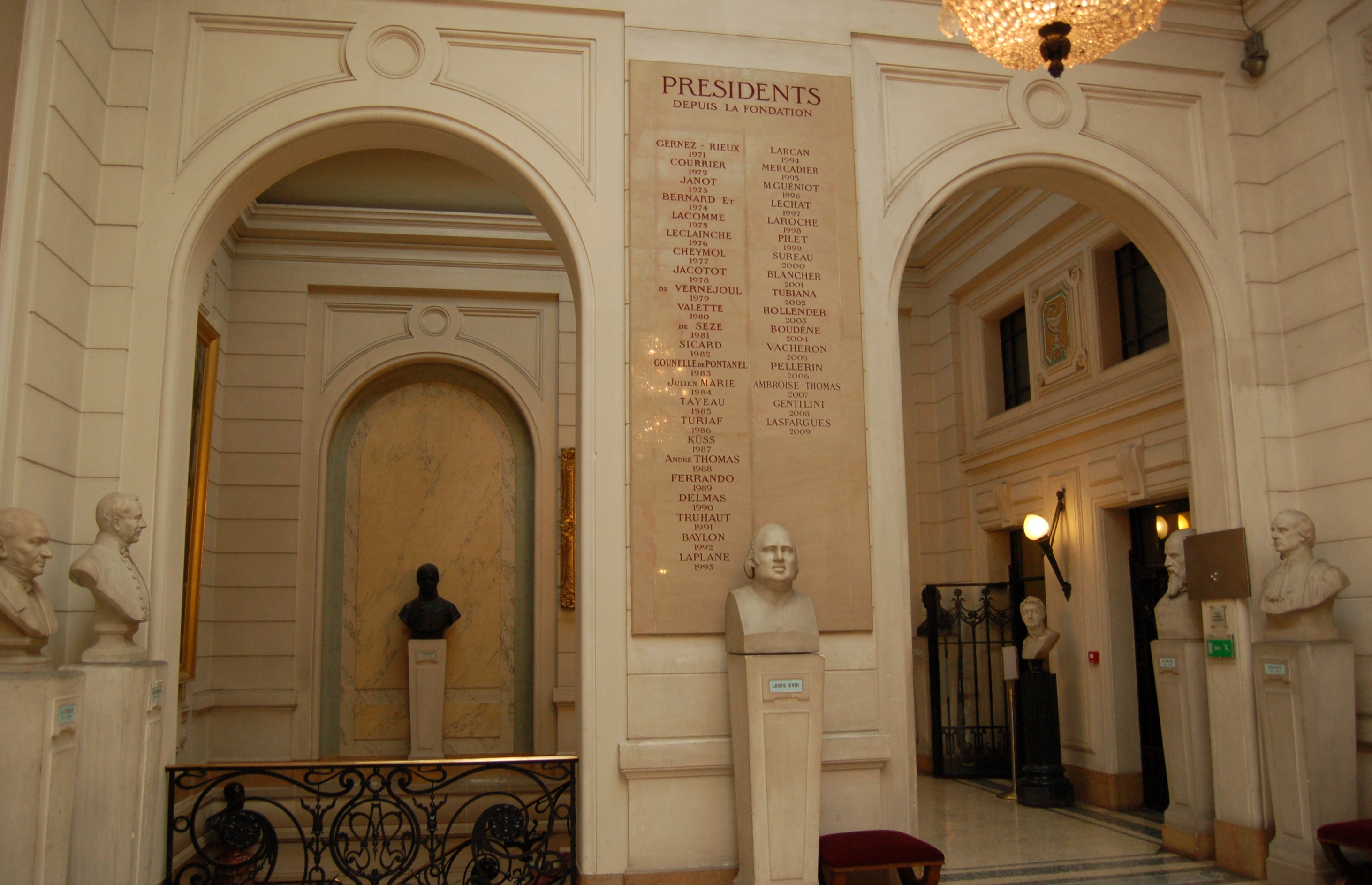 Liste des présidents de l'Académie nationale de Médecine, Paris, France